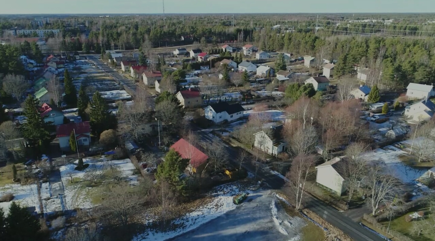 Ruokolan kaupunginosa Uudessakaupungissa koostuu valtaosin ns. rintamiestaloista.